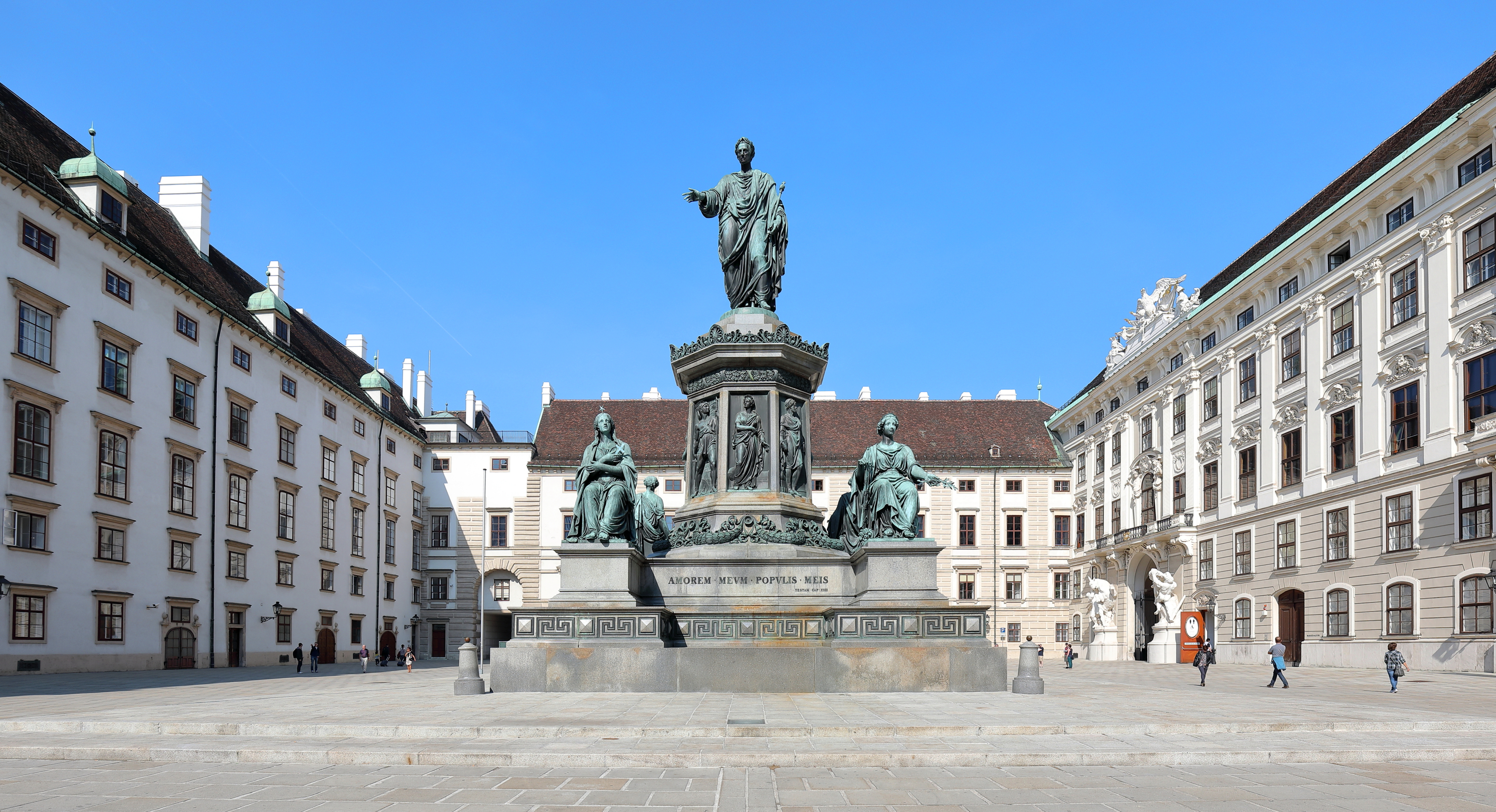 Das Denkmal Kaiser Franz I. (II.) am Inneren Burgplatz (In der Burg) der Hofburg in der österreichischen Bundeshauptstadt Wien. Links der Leopoldinischer Trakt, hinter dem Denkmal der Amalientrakt (Amalienburg) und rechts der Reichskanzleitrakt.Das Monumentaldenkmal für den ersten österreichischen Kaiser und letzten des Heiligen Römischen Reiches Franz I. (II.) wurde auf Veranlassung von Kaiser Ferdinand I. von dem Bildhauer Pompeo Marchesi geschaffen und am 16. Juni 1846 enthüllt. Es stellt den Kaiser auf einem achteckigen Pfeiler in antiker Gewandung dar. An den Seitenfronten des Pfeilers sind bronzene Reliefs angebracht, die die Tätigkeiten des Volkes darstellen. Flankiert wird der Pfeiler von vier Kolossalstatuen, die den Glauben, die Stärke, den Frieden und die Gerechtigkeit symbolisieren.